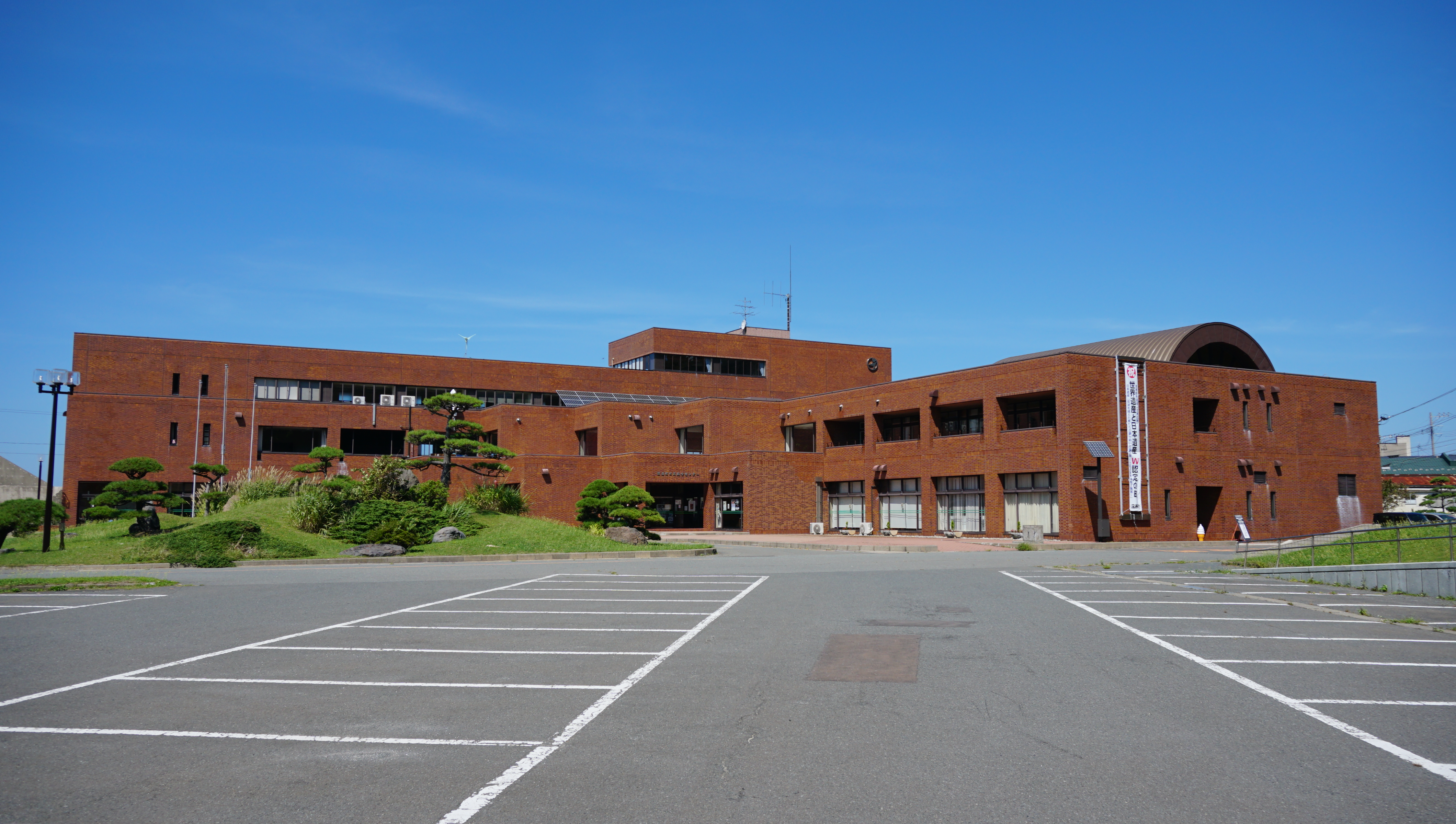 深浦町役場（青森県西津軽郡）